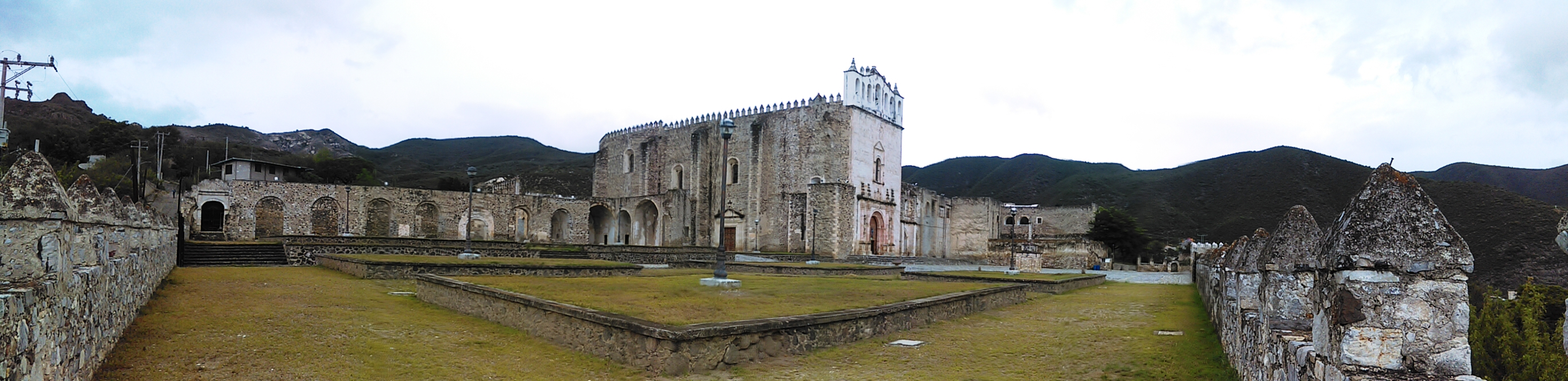 Templo y exconvento de los Santos Reyes, Metztitlán.